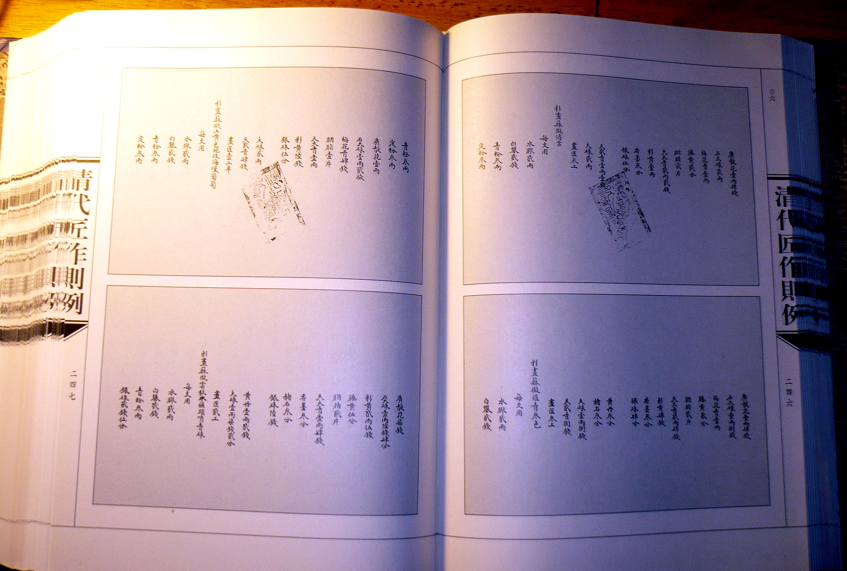 圆明园苏式彩画